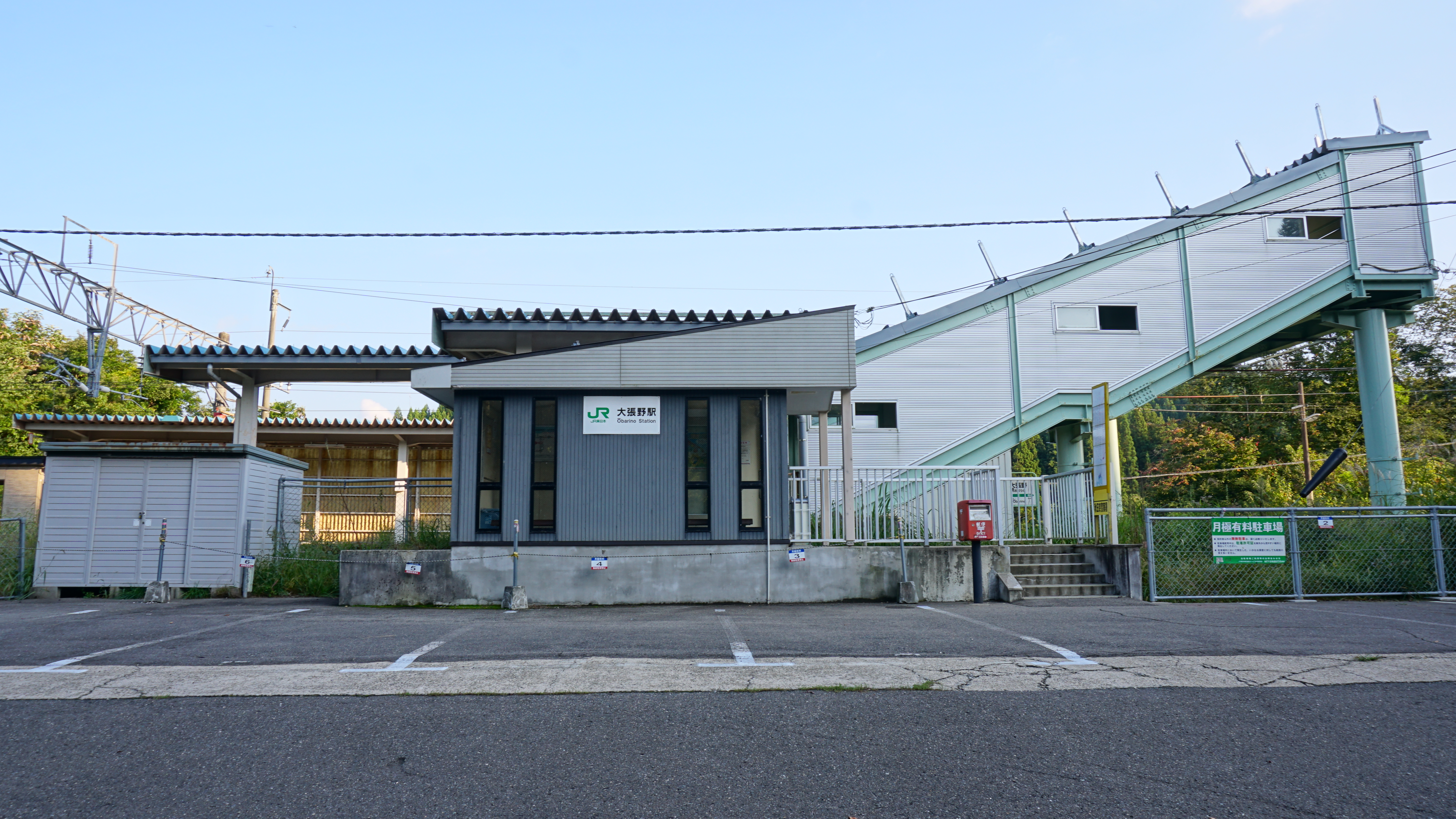 奥羽本線 大張野駅（秋田県秋田市）